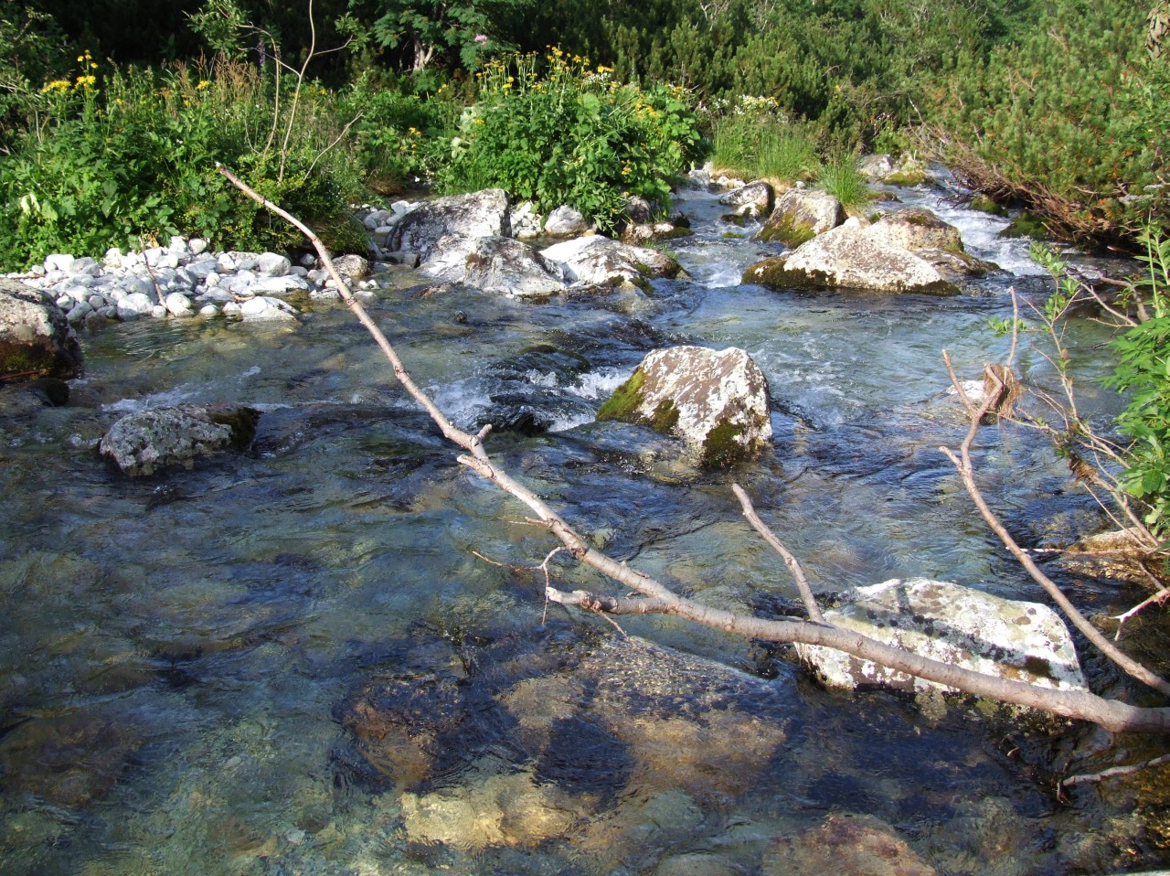 Zielony Potok Kieżmarski (Zelený potok) w Zielonej Dolinie Kieżmarskiej w Tatrach